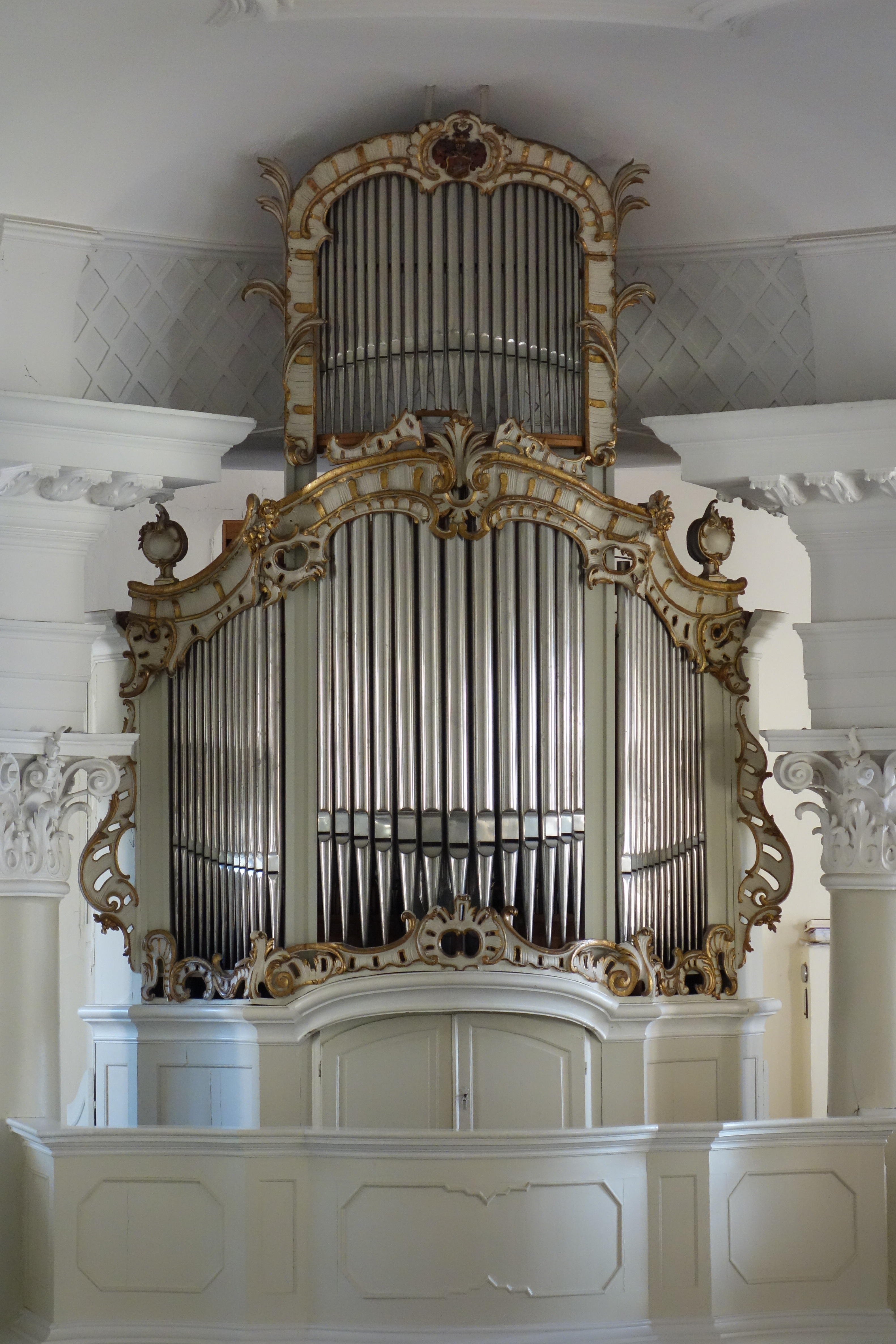 Stiftskirche Steterburg, Orgel mit Orgelprospekt von 1768